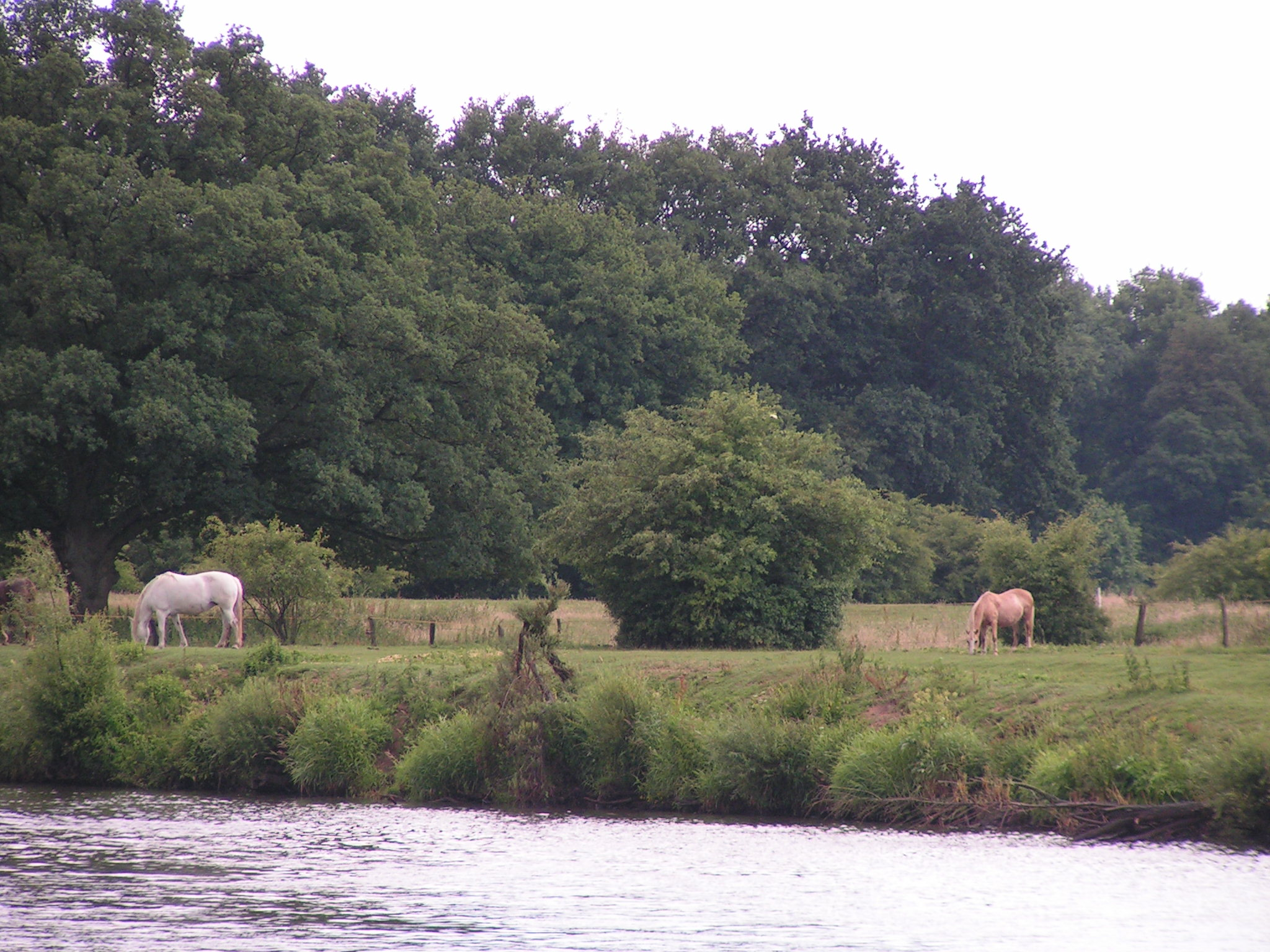 Ems bei Haren